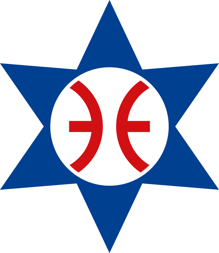 臺北州立水產試驗場徽章於1933年3月28日公告，外圍為藍色星狀圖樣，中央為紅色的「北」字